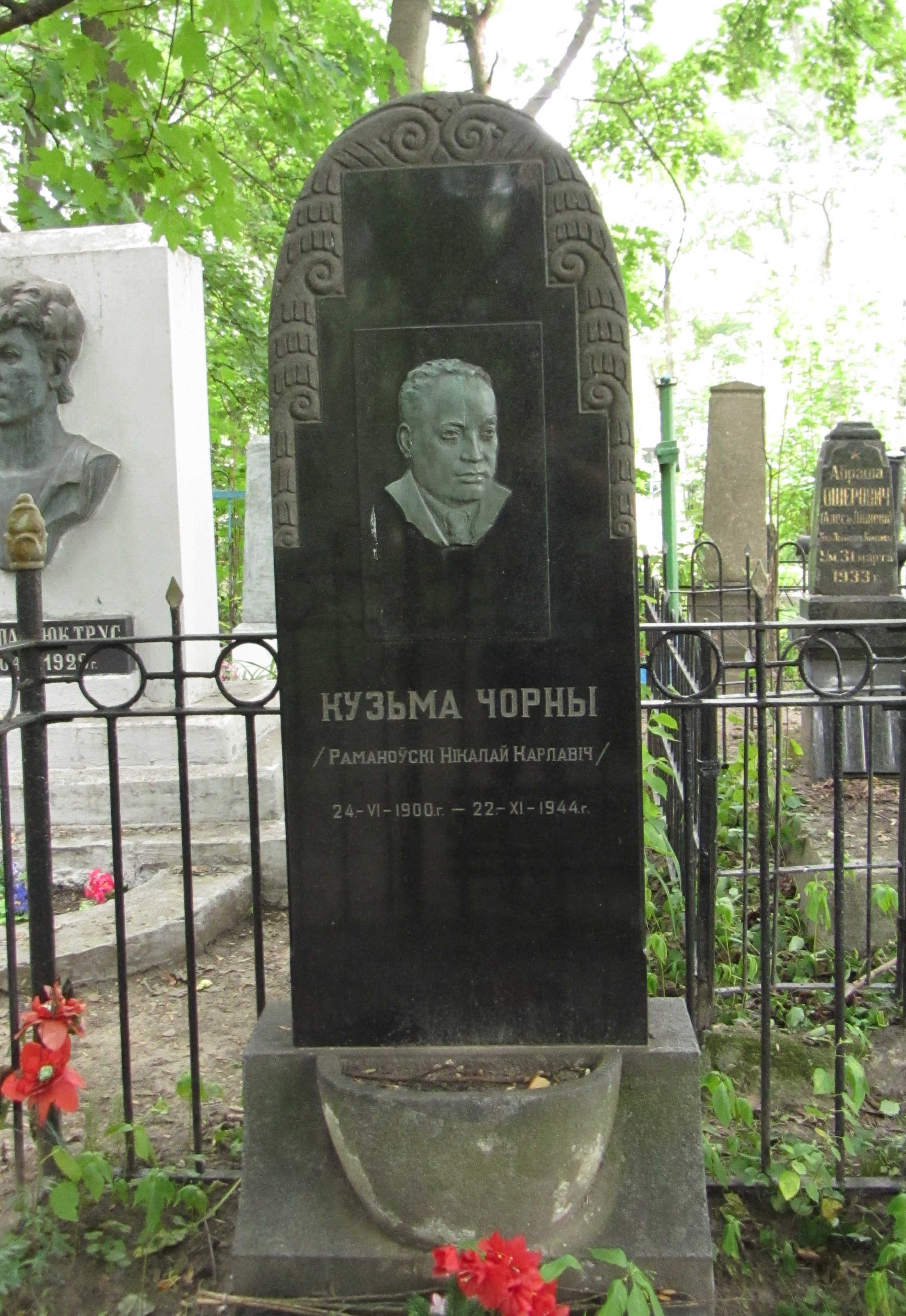 Беларуская (тарашкевіца): Помнік Кузьму Чорнаму. Вайсковыя могілкі, Менск